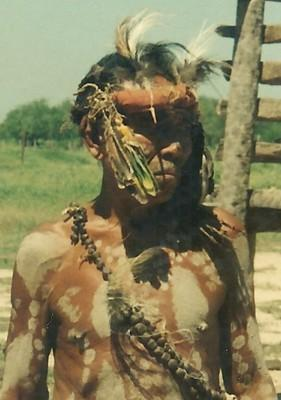 Konzaho Faustino (ebytoso), Puerto Esperanza, Paraguay Febrero de 1990